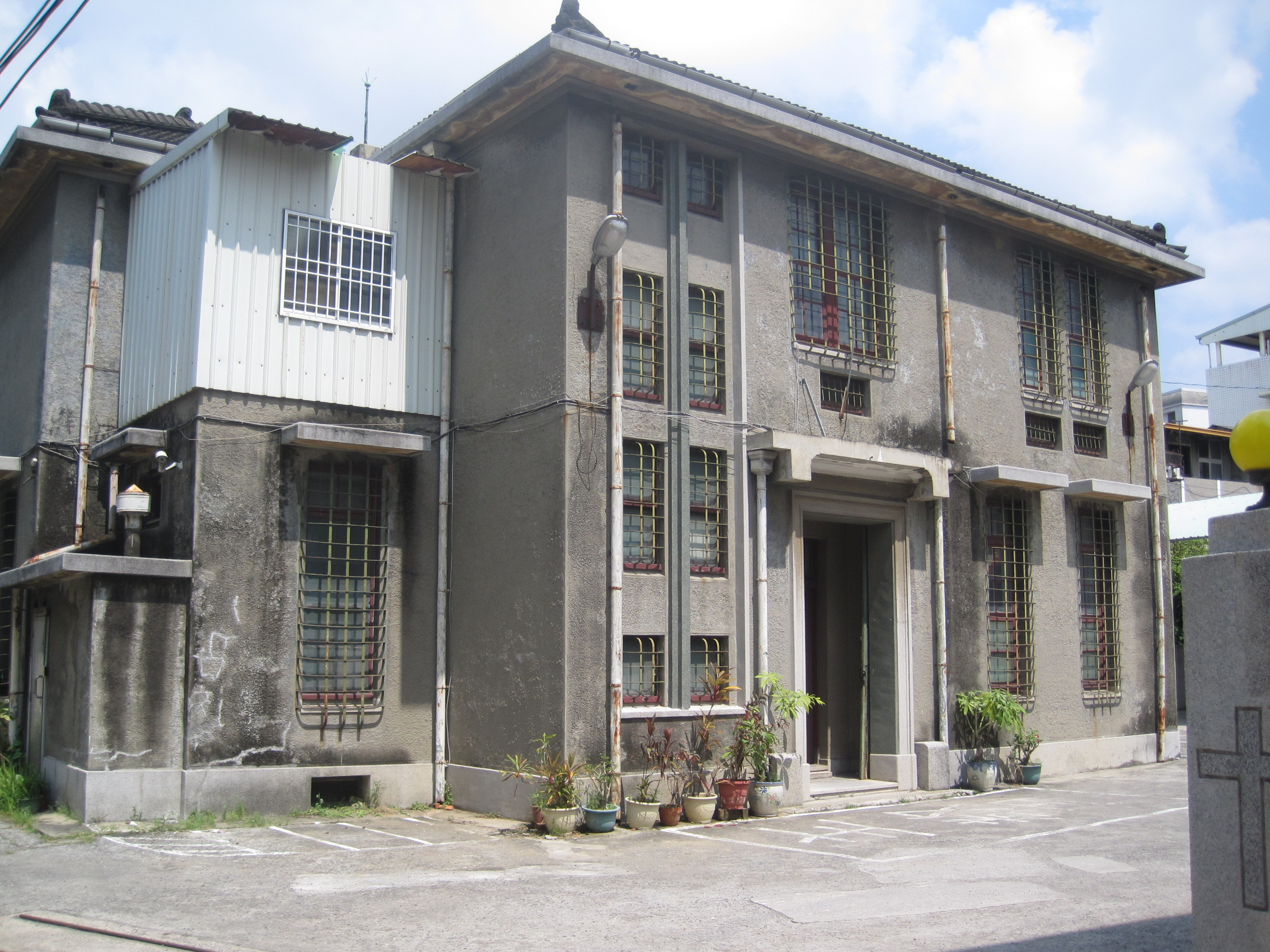 張有忠在臺南的宅邸與律師事務所